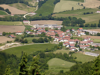 Iraizotz herria Aranotz menditik ikusita. Panoramica de Iraizotz desde el monte de Aranotz. 2006ko ekaina J.E.